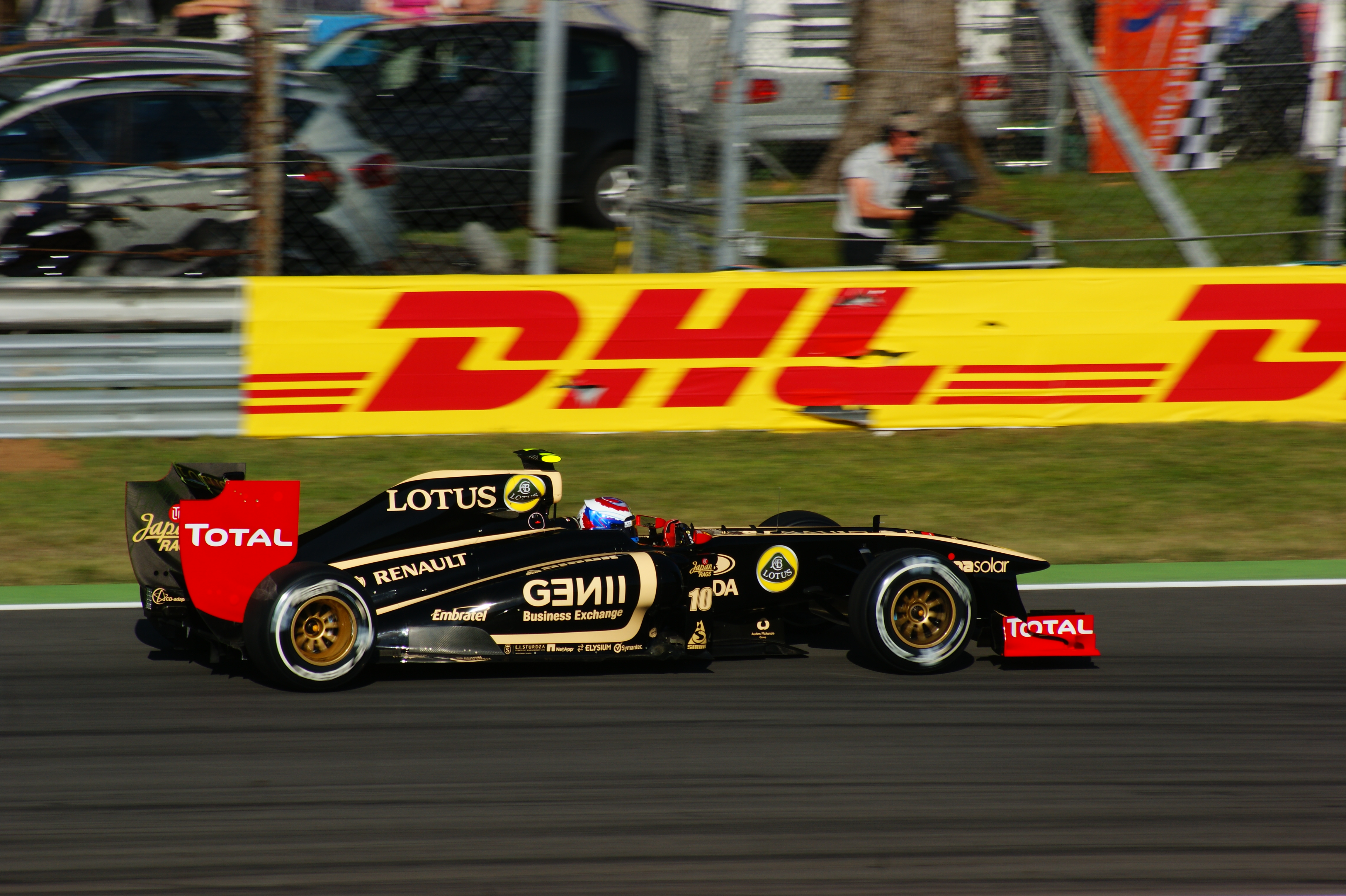 Vitaly Petrov alla prima variante Monza 2011